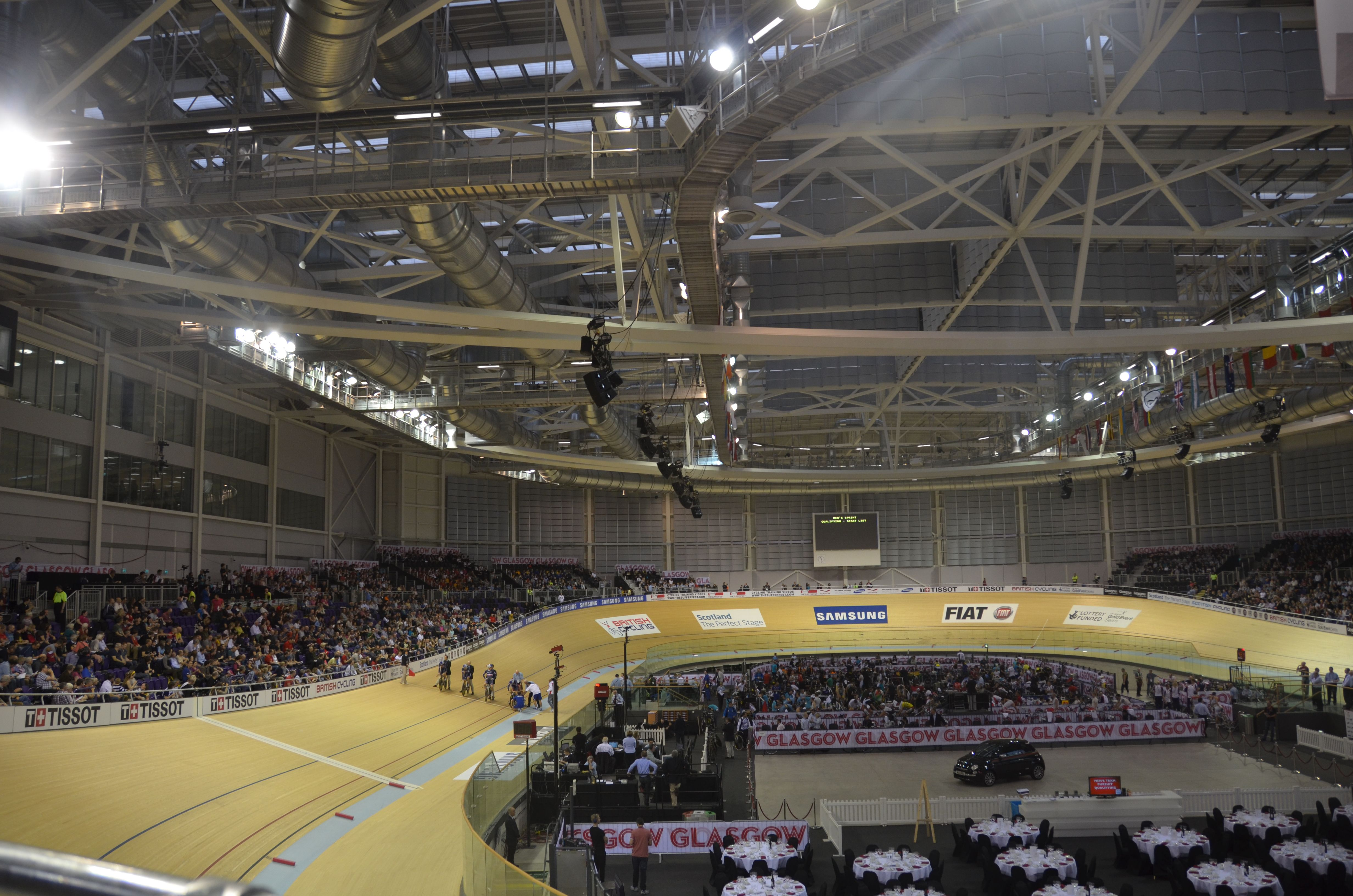 Bahnrad-Weltcup 2012